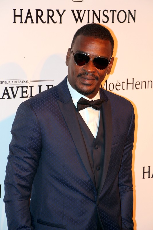 26 - Seu Jorge-002